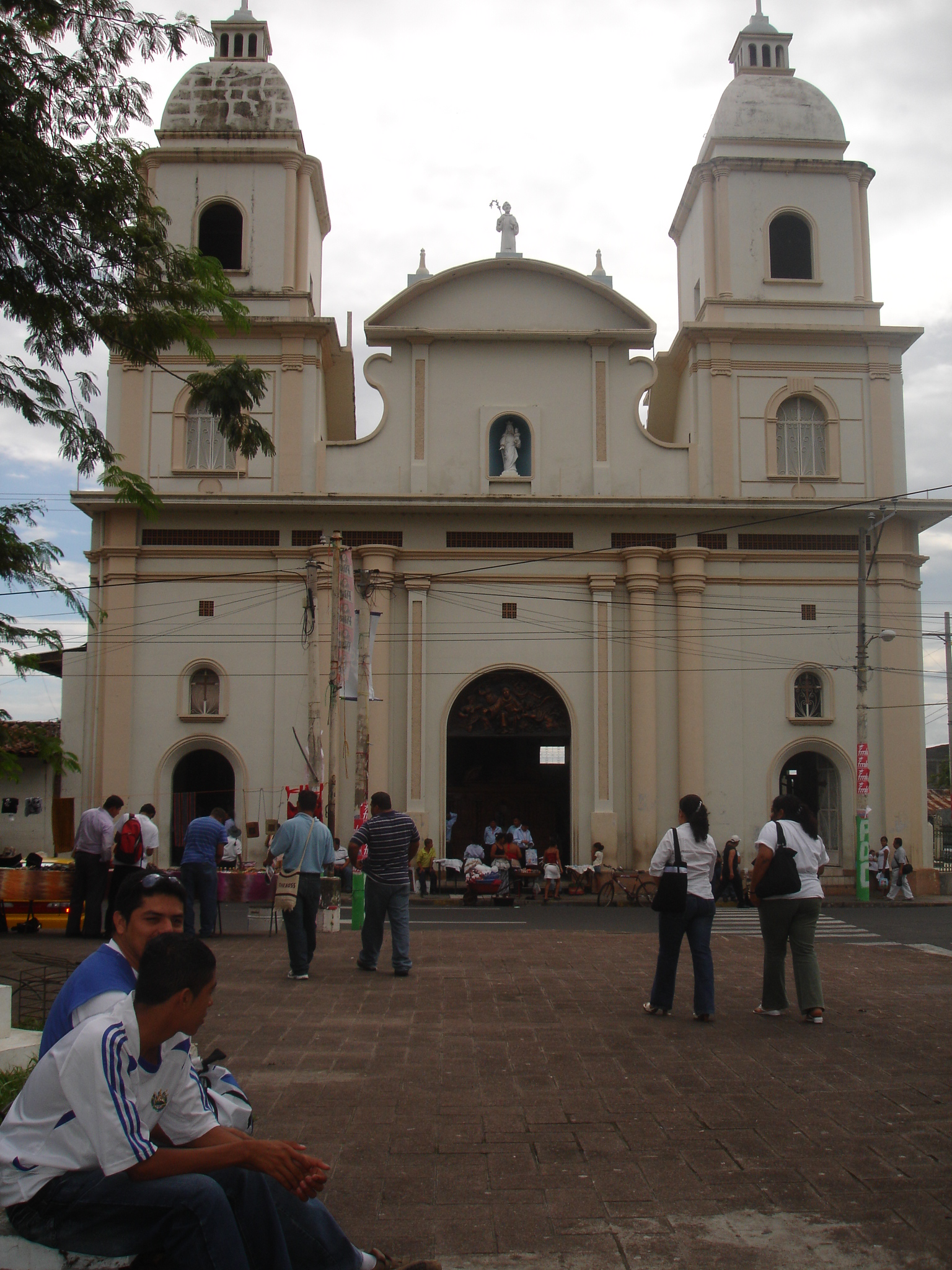 Catedral de San Vicente